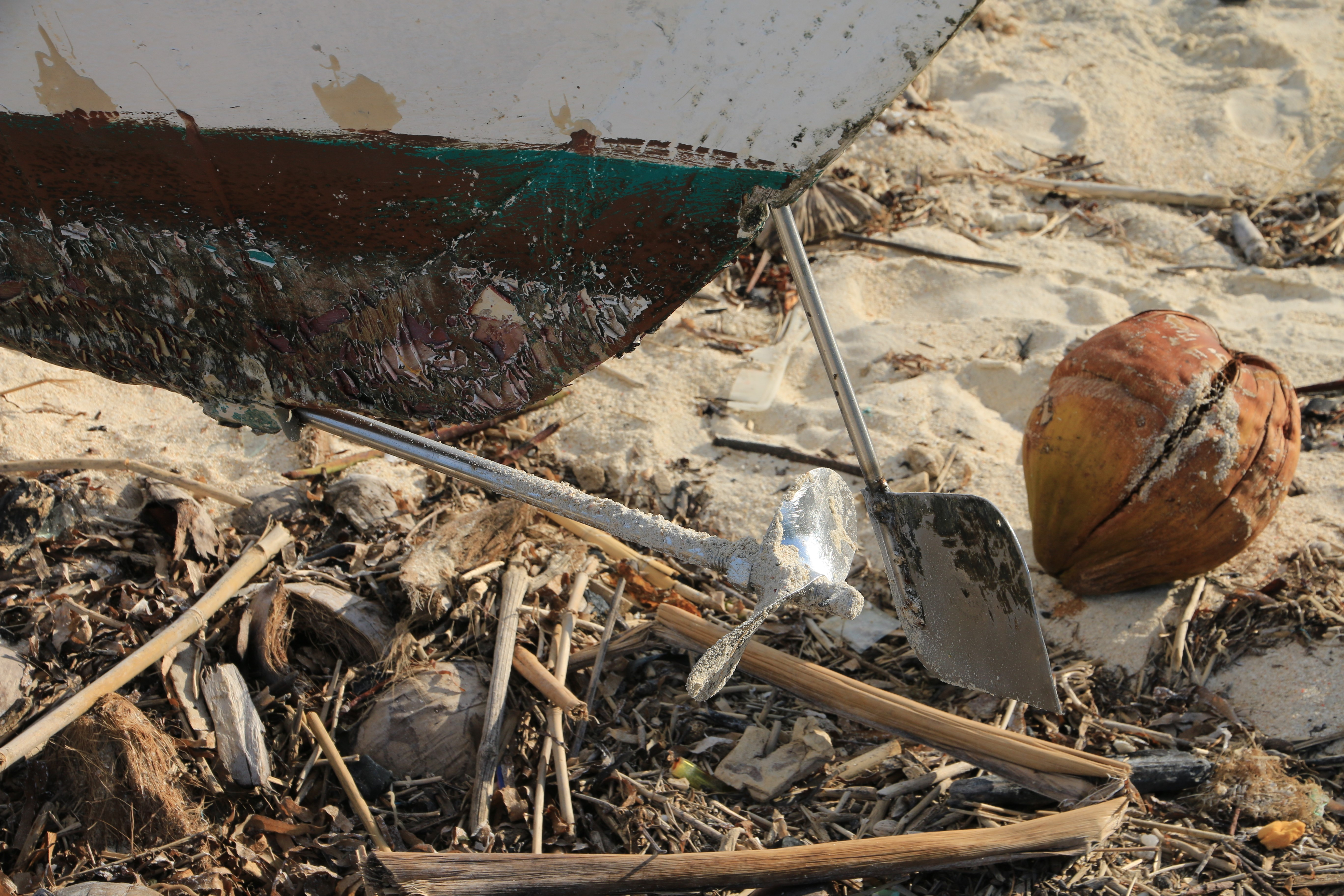 Bangka propell ror